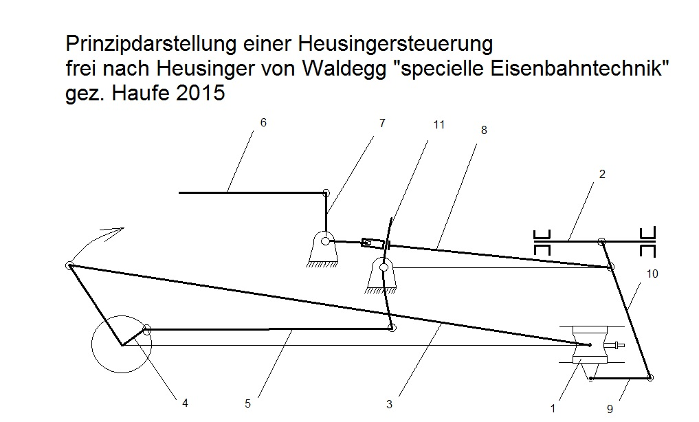 Prinzipdarstellung der Wirkungsweise einer Heusinger-Steuerung Kreuzkopf Schieberschubstange Treibstange Gegenkurbel Schwingenstange Steuerstange Hängeeisen, Aufwerfhebel, Steuerstangenhebel Schieberschubstange Lenkerstange Voreilhebel Schwinge